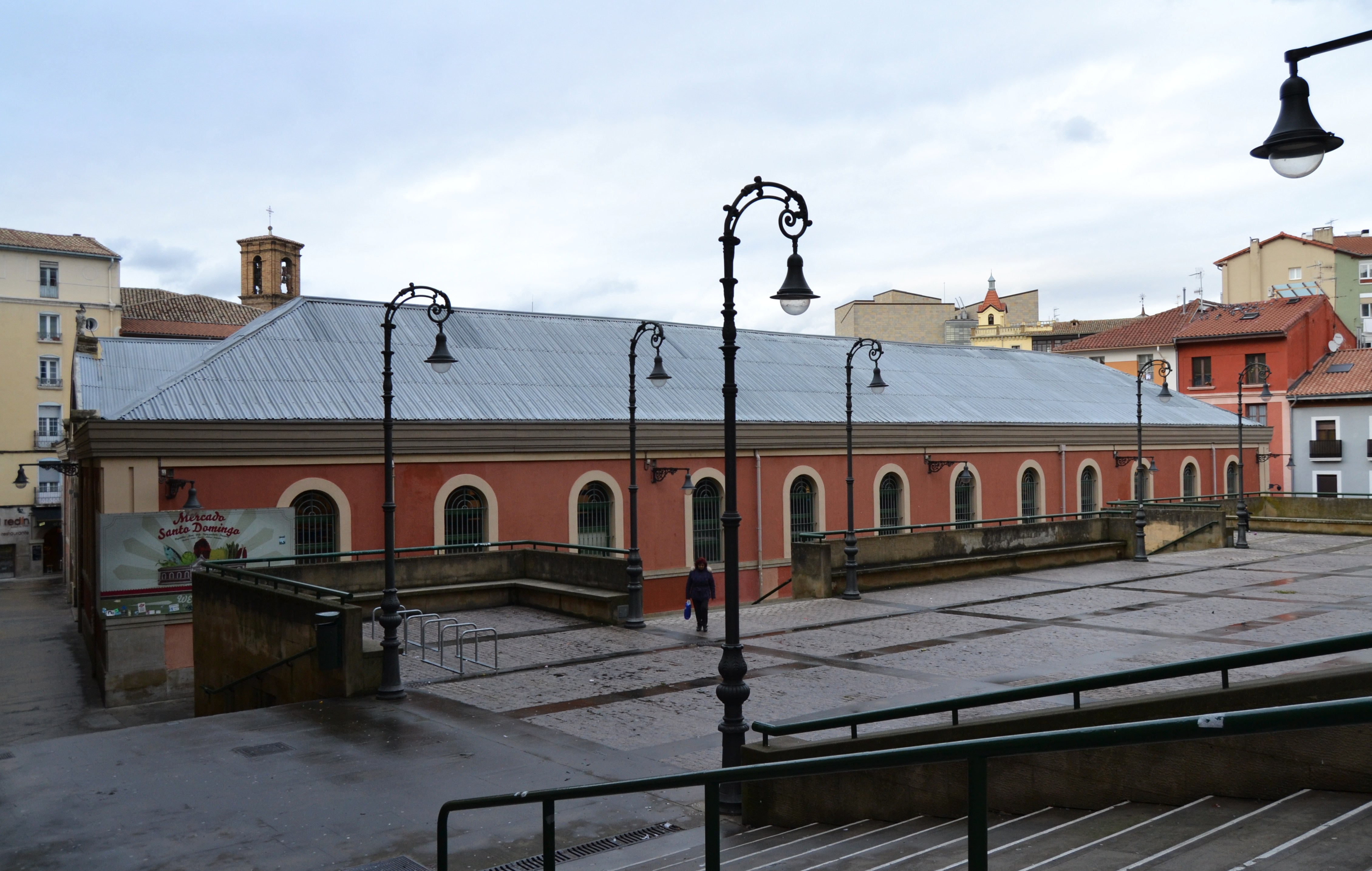 Vista lateral del mercat de Santo Domingo, Pamplona.